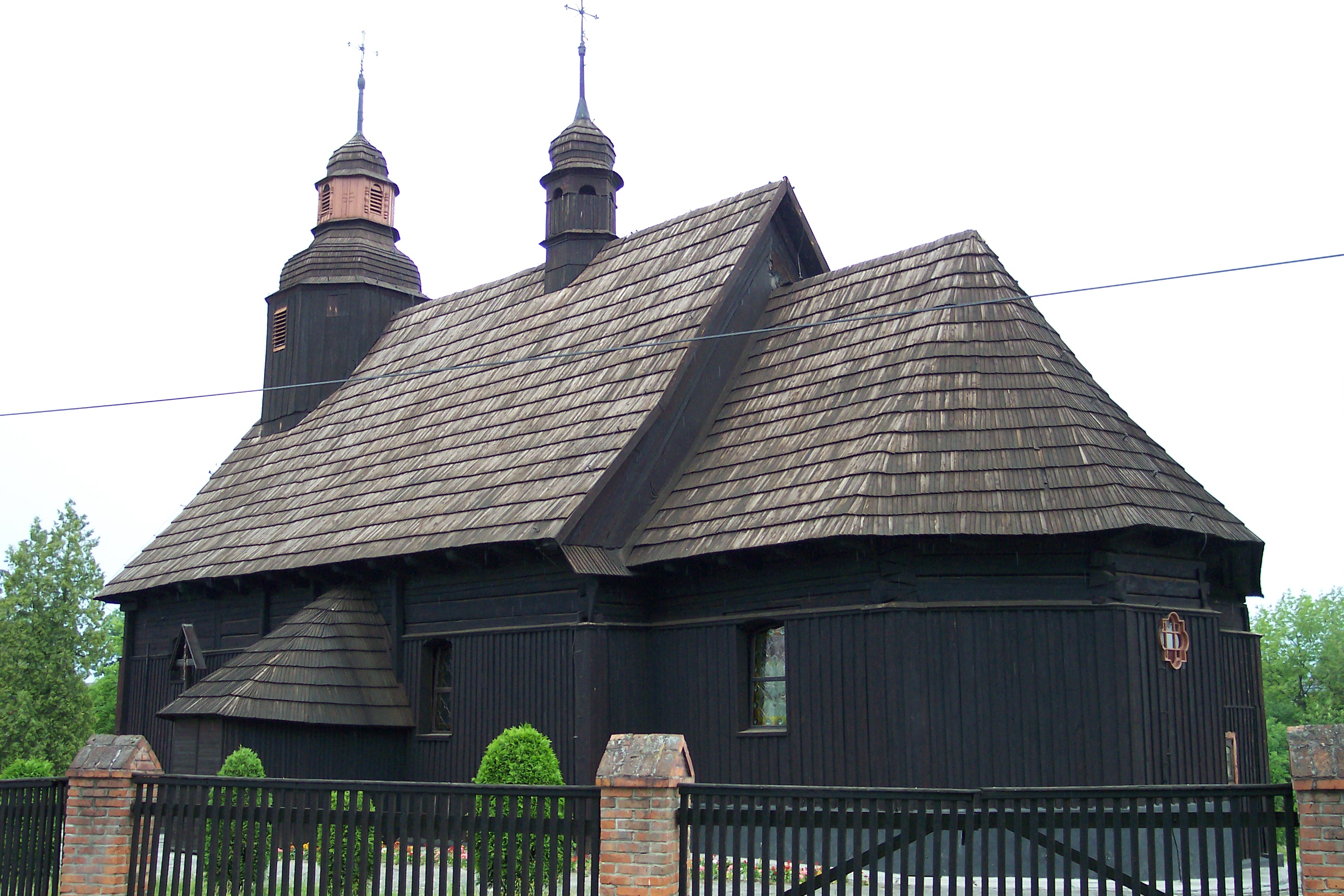 Radawie - kościół Podwyższenia Krzyża Świętego (zabytek nr 88/54 z 24.03.1954)